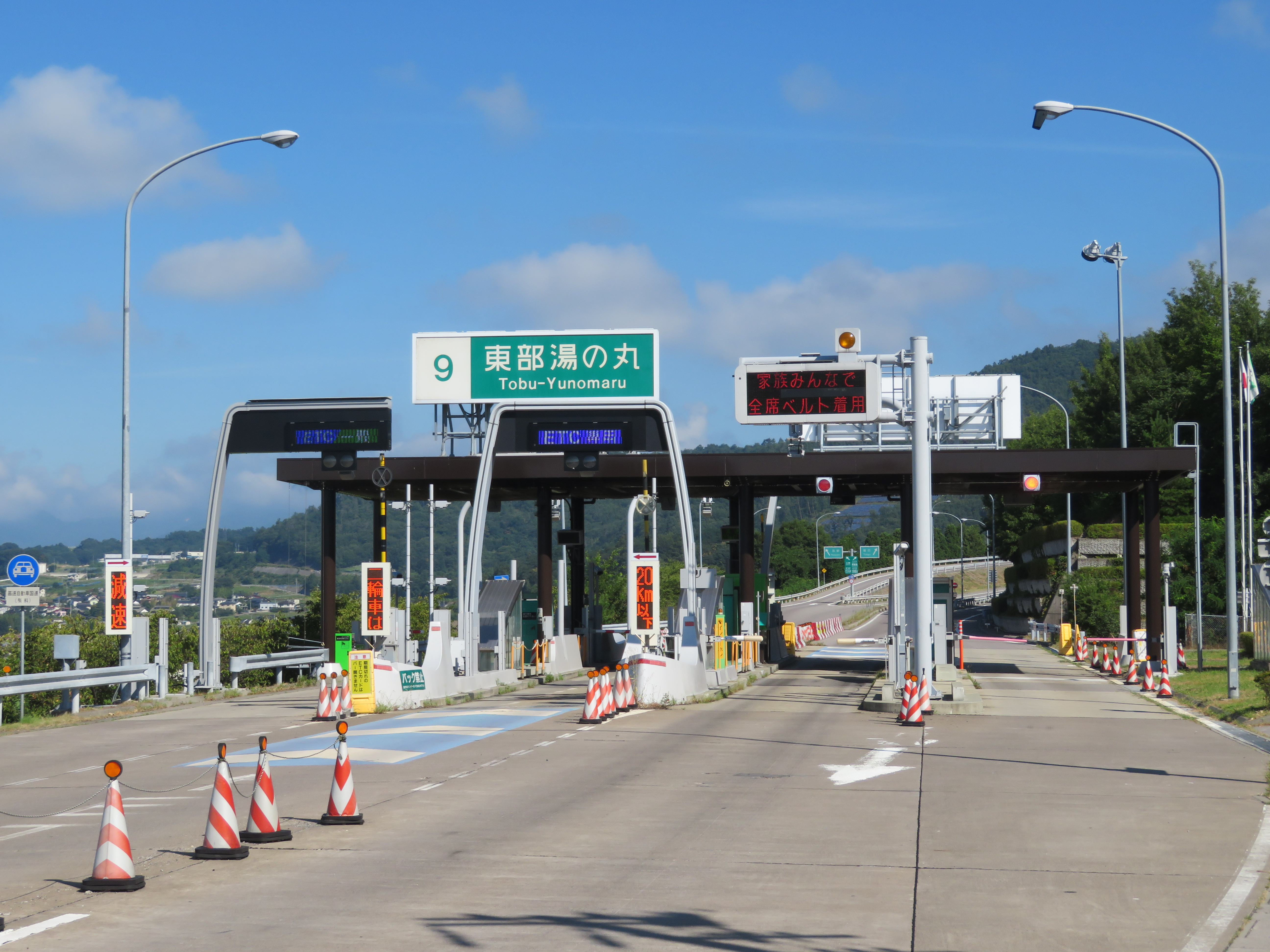 上信越自動車道 東部湯の丸ＩＣ 料金所付近（一般道側から撮影）